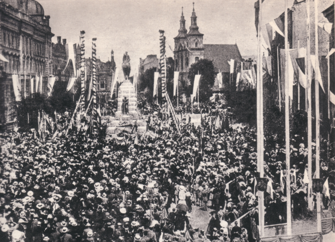 The Grunwaldzki Monument in Kraków, Poland